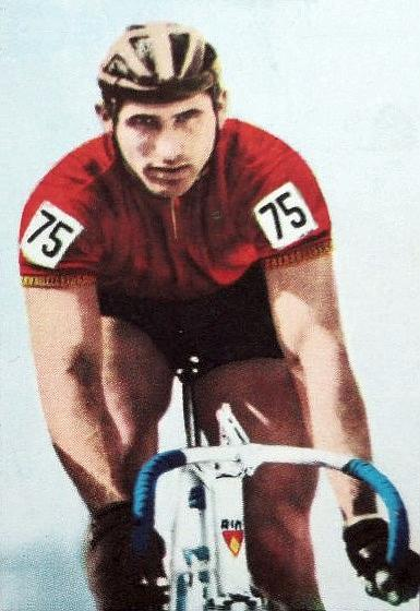 Omar Pchakadze (Omar Pkhakadze - 1969), 'Campioni dello sport 1969 - 1970', Panini figurina n°429.